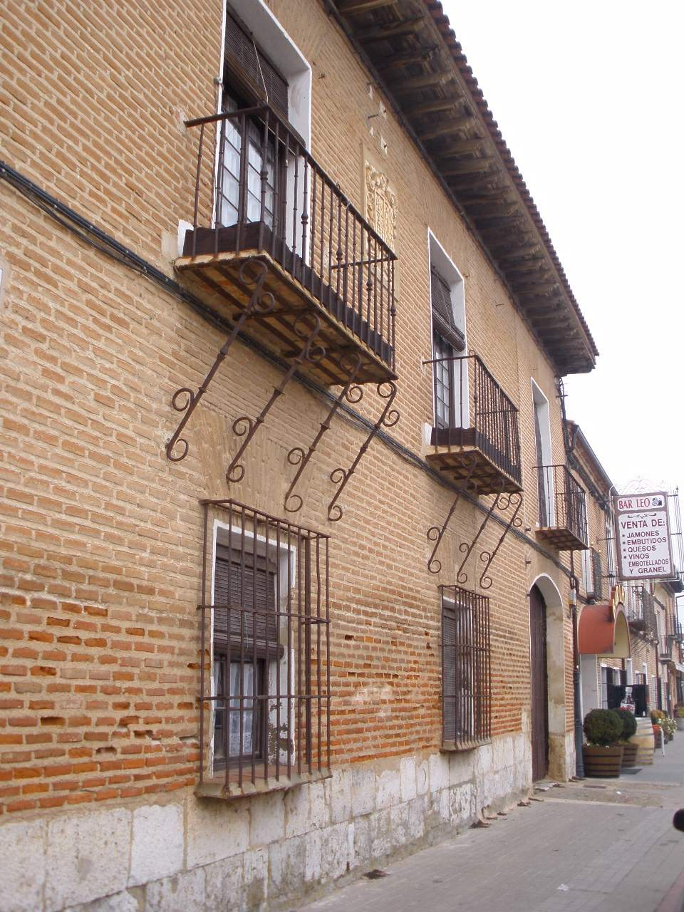 Rueda (Valladolid)